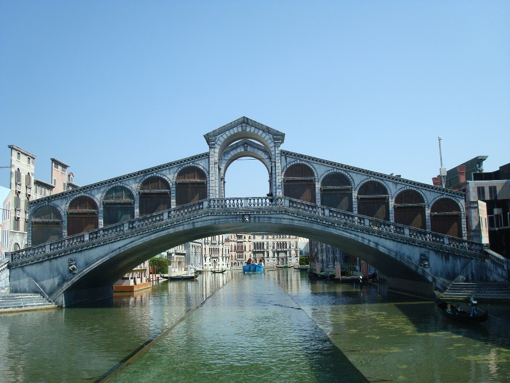 Italie en miniature (Rimini)- Circuit de venise miniature, le pont du Rialto